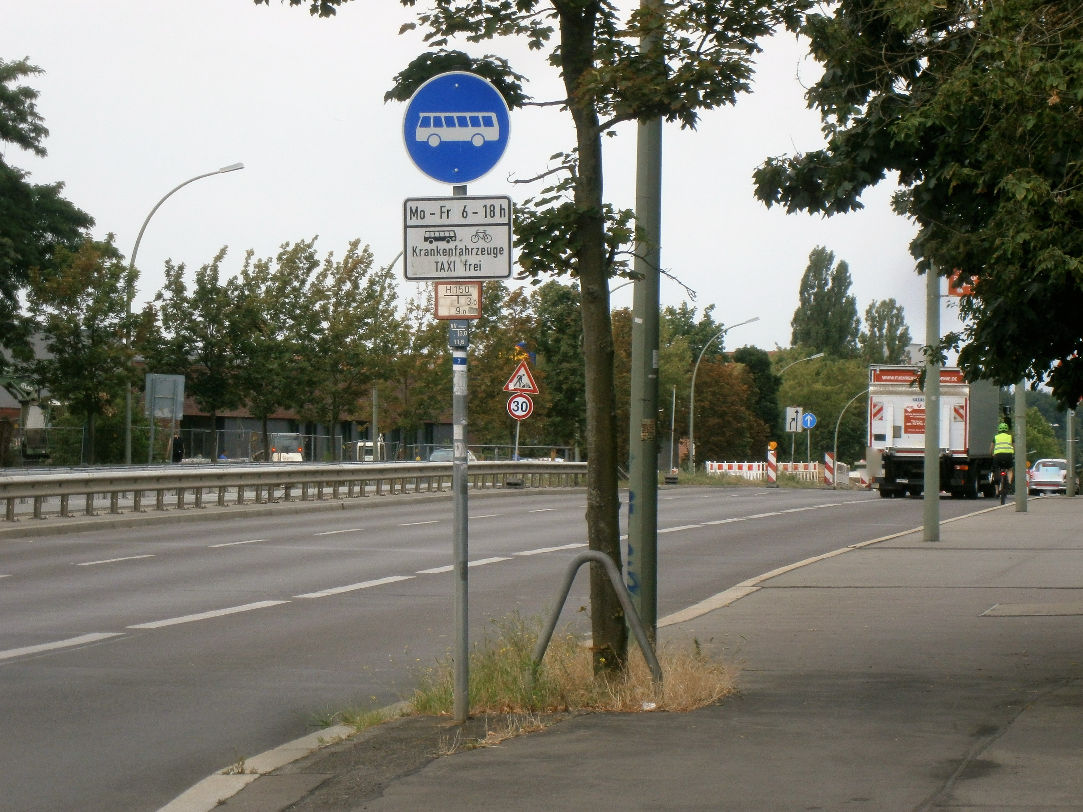 Die Kniprodebrücke liegt im Straßenzug der Kniprodestraße über die Ringbahn im Berliner Ortsteil Prenzlauer Berg.